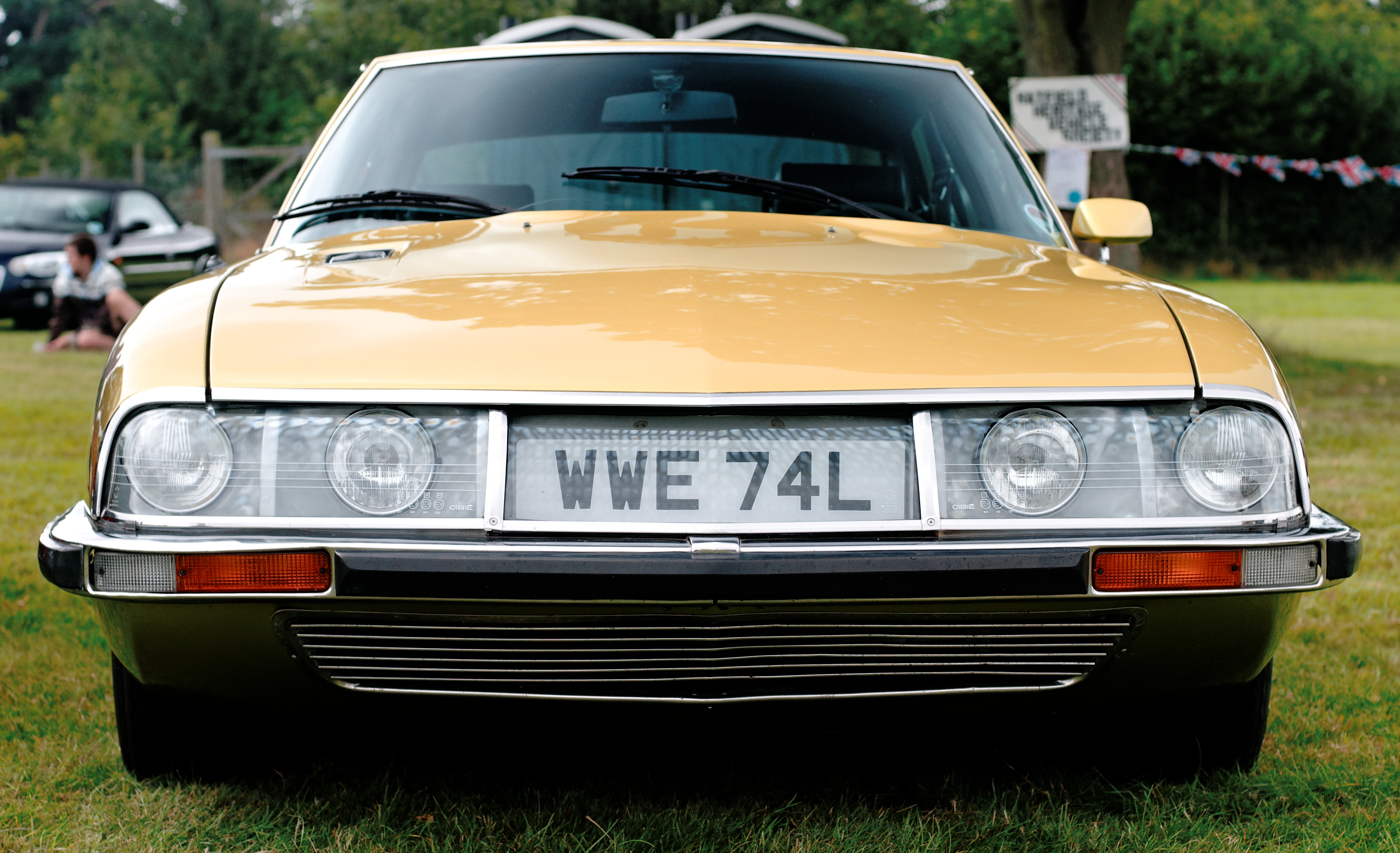 Citroen SM.